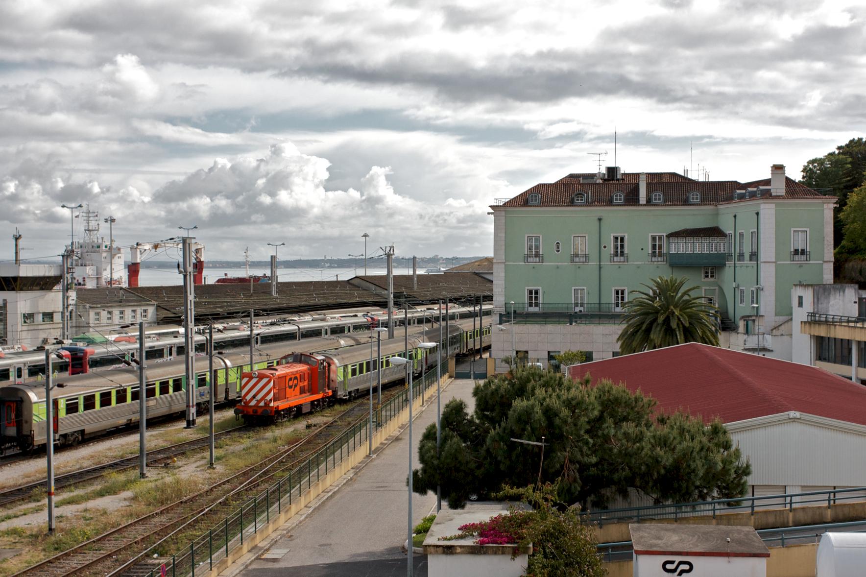 Local: Estação de Lisboa • Santa Apolónia [Linha do Norte, PK 0,0] Data e hora: 21 de Abril de 2011 [16h35] Material: Locomotiva 14xx [English Electric • Sorefame]